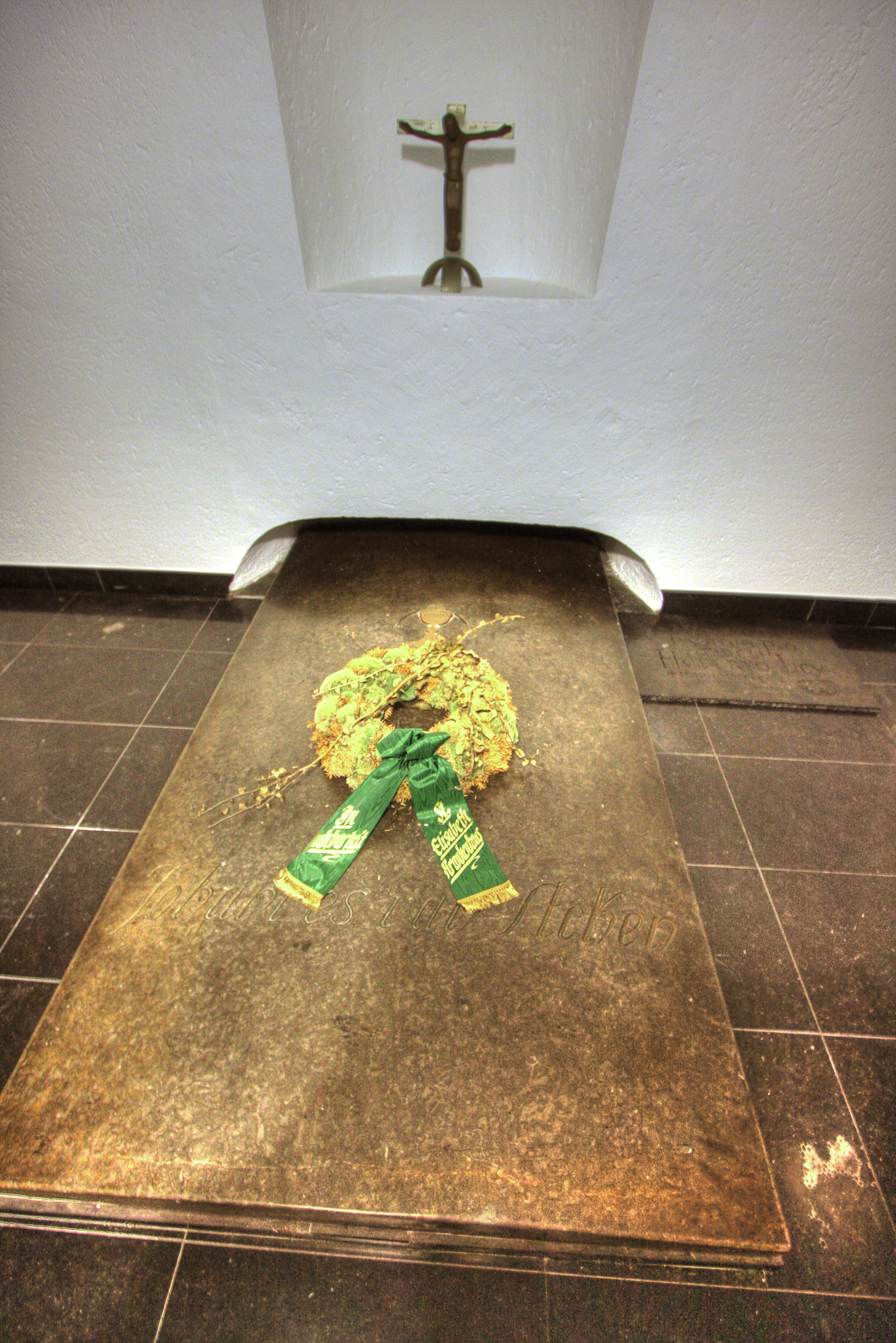 Grabmal von Johannes van Acken